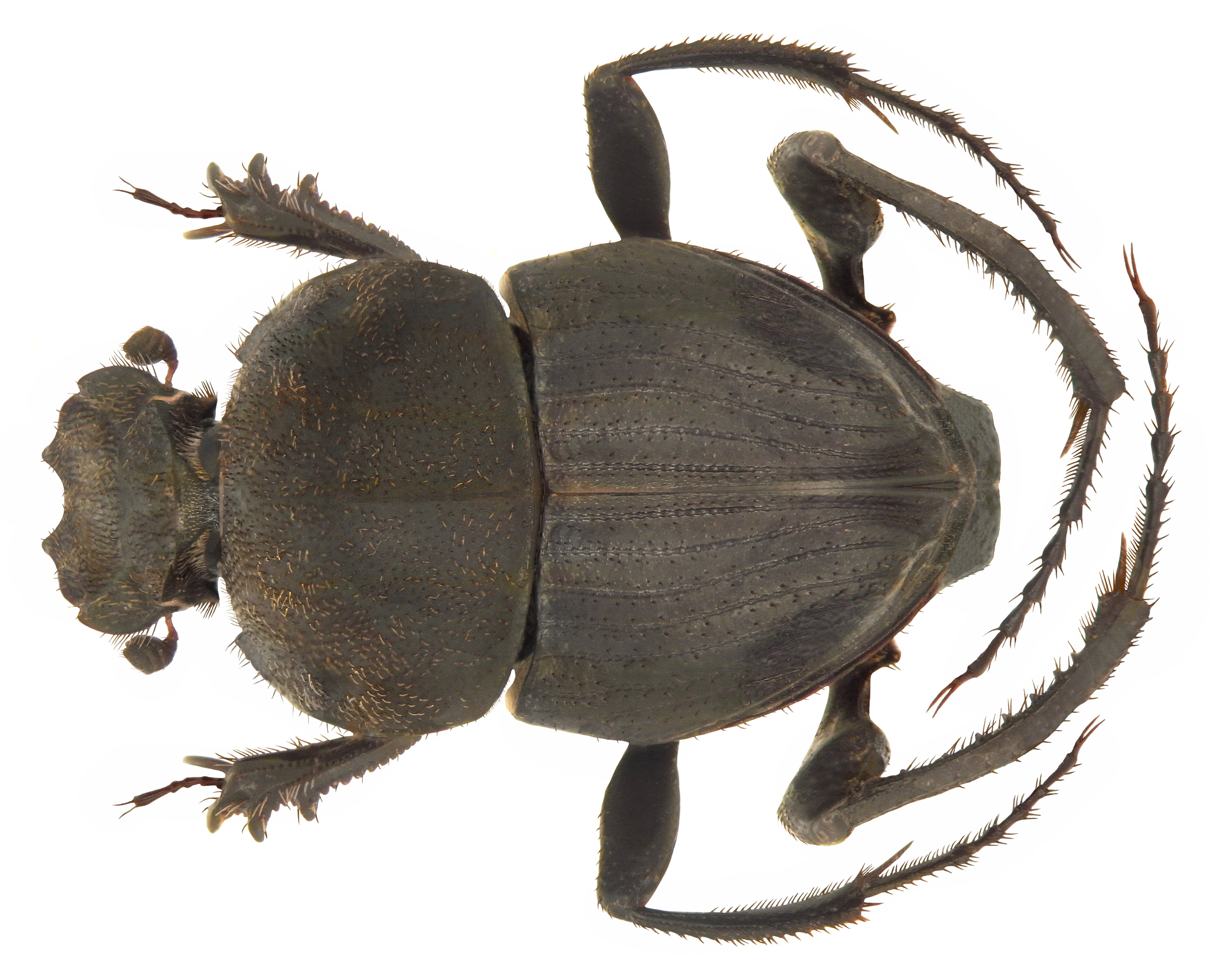 Familie: Scarabaeidae Groesse: 8-10 mm Verbreitung: Europa, Nordafrika, Mittelasien, China Fundort: Azerbaijan, Lankoran leg. M.Hauser, 1996; det. J.Scheuern, 1998 Photo: U.Schmidt, 2010